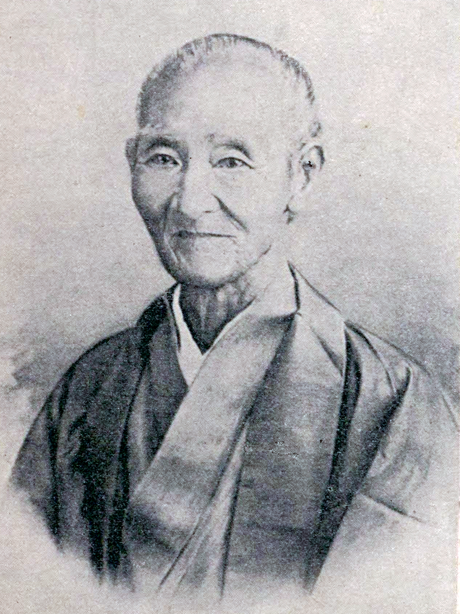 幕末江戸幕府の老中・小笠原壱岐守長行